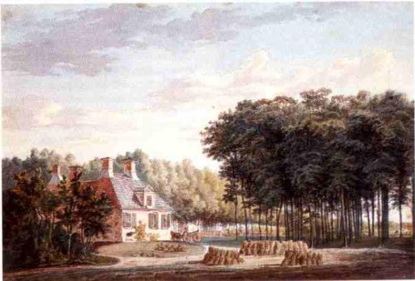 Lycklama-Bosch